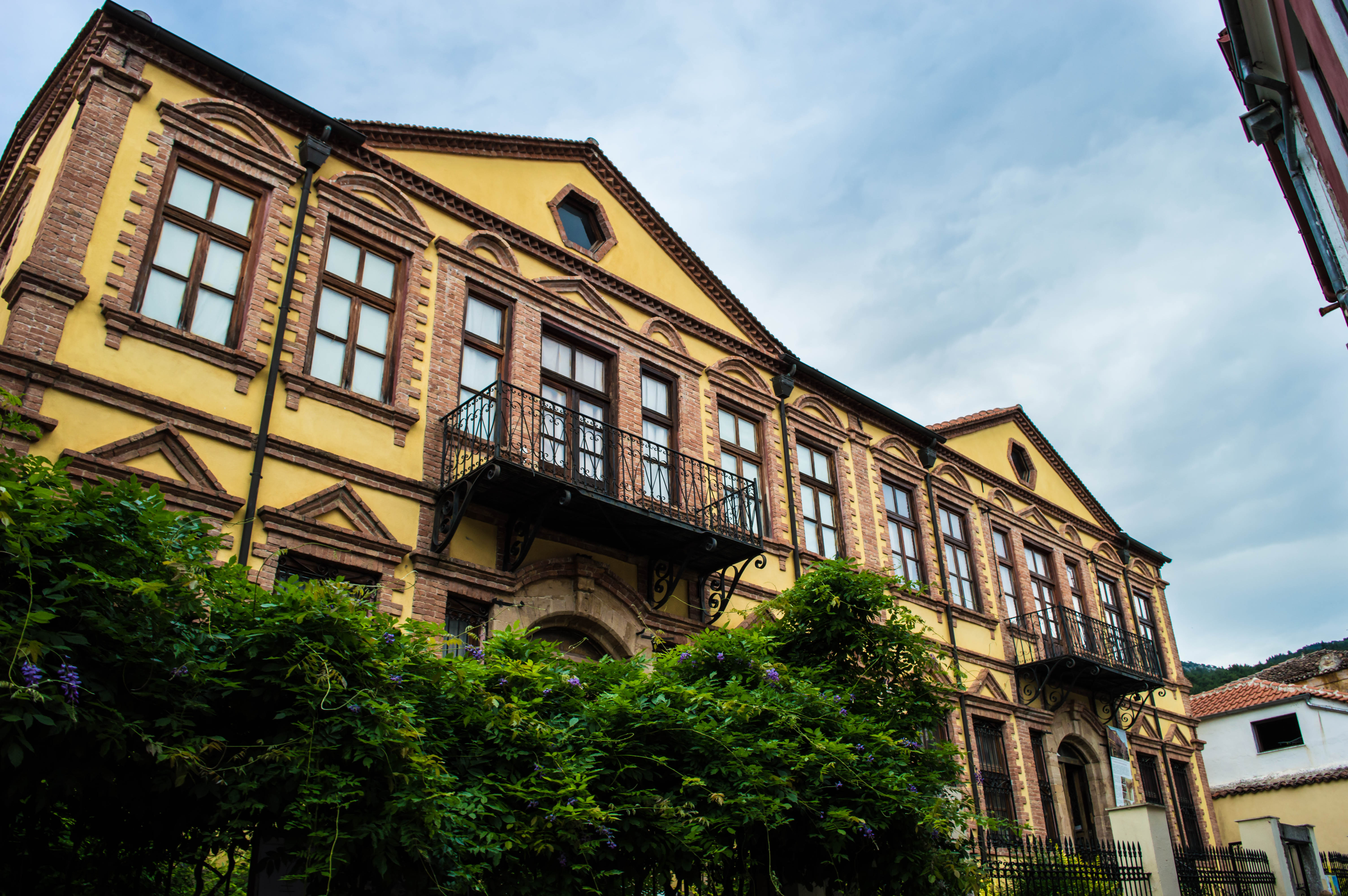 Λαογραφικό Μουσείο Ξάνθης«Αρχοντικό Κουγιουμτζόγλου»